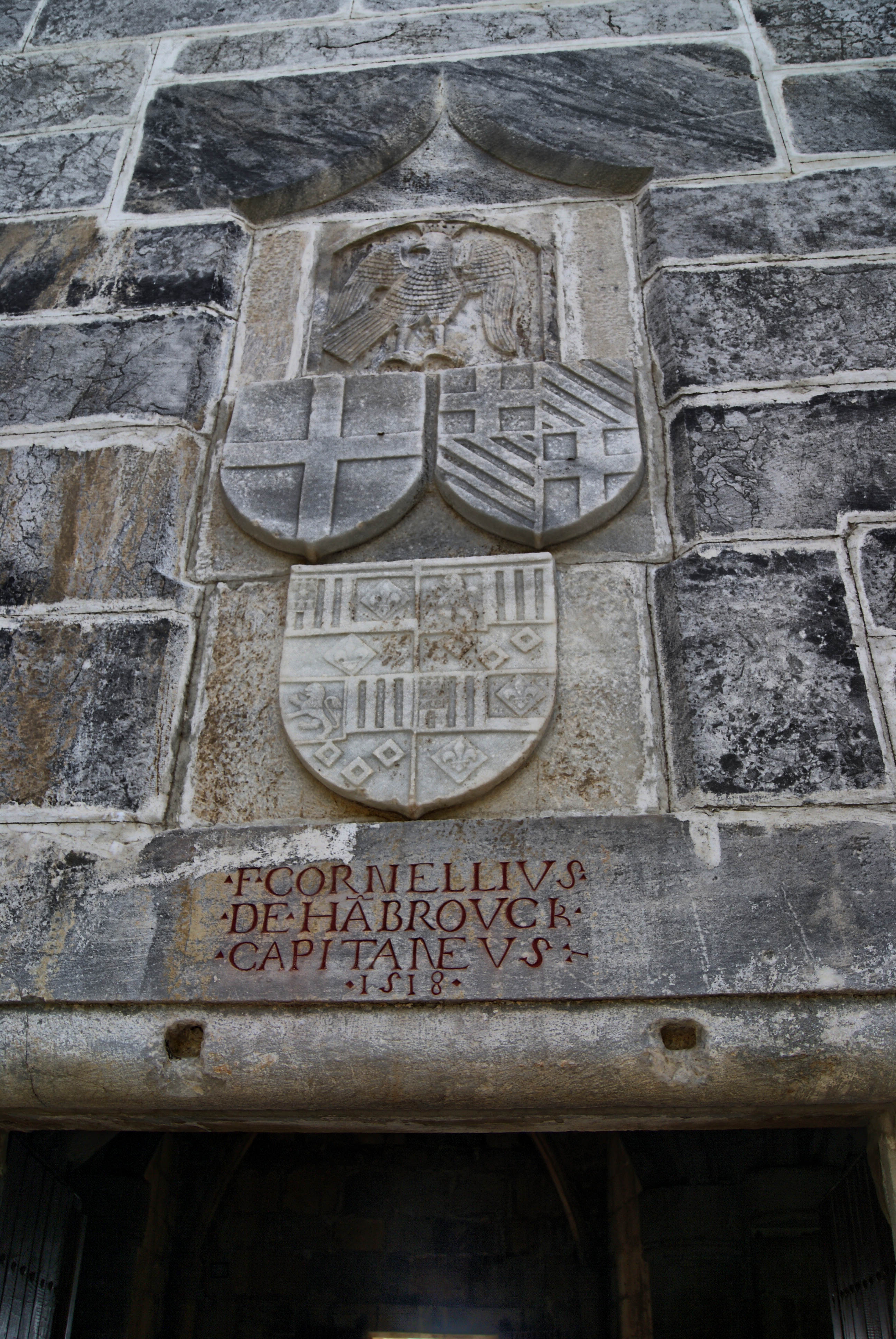 Bodrum